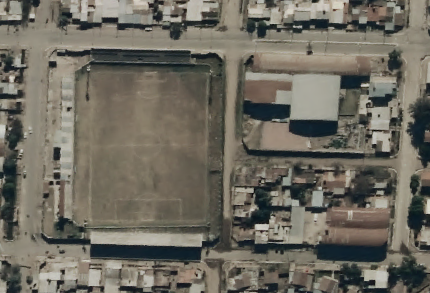 A la izquierda: Estadio Ingeniero José María Paz. Arriba a la derecha: otras instalaciones del Club Atlético Concepción de Banda del Río Salí